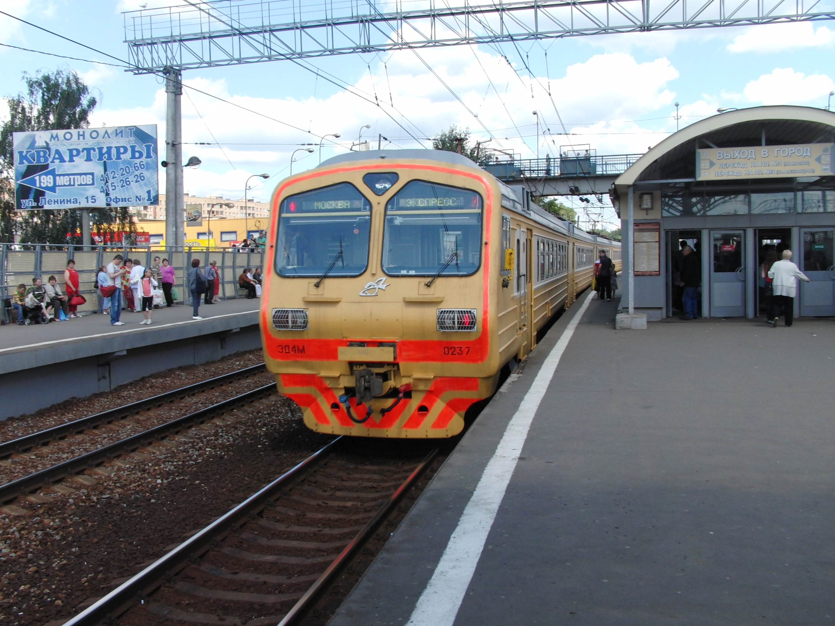 Orekhovo-Zuevo station, train to Vladimir